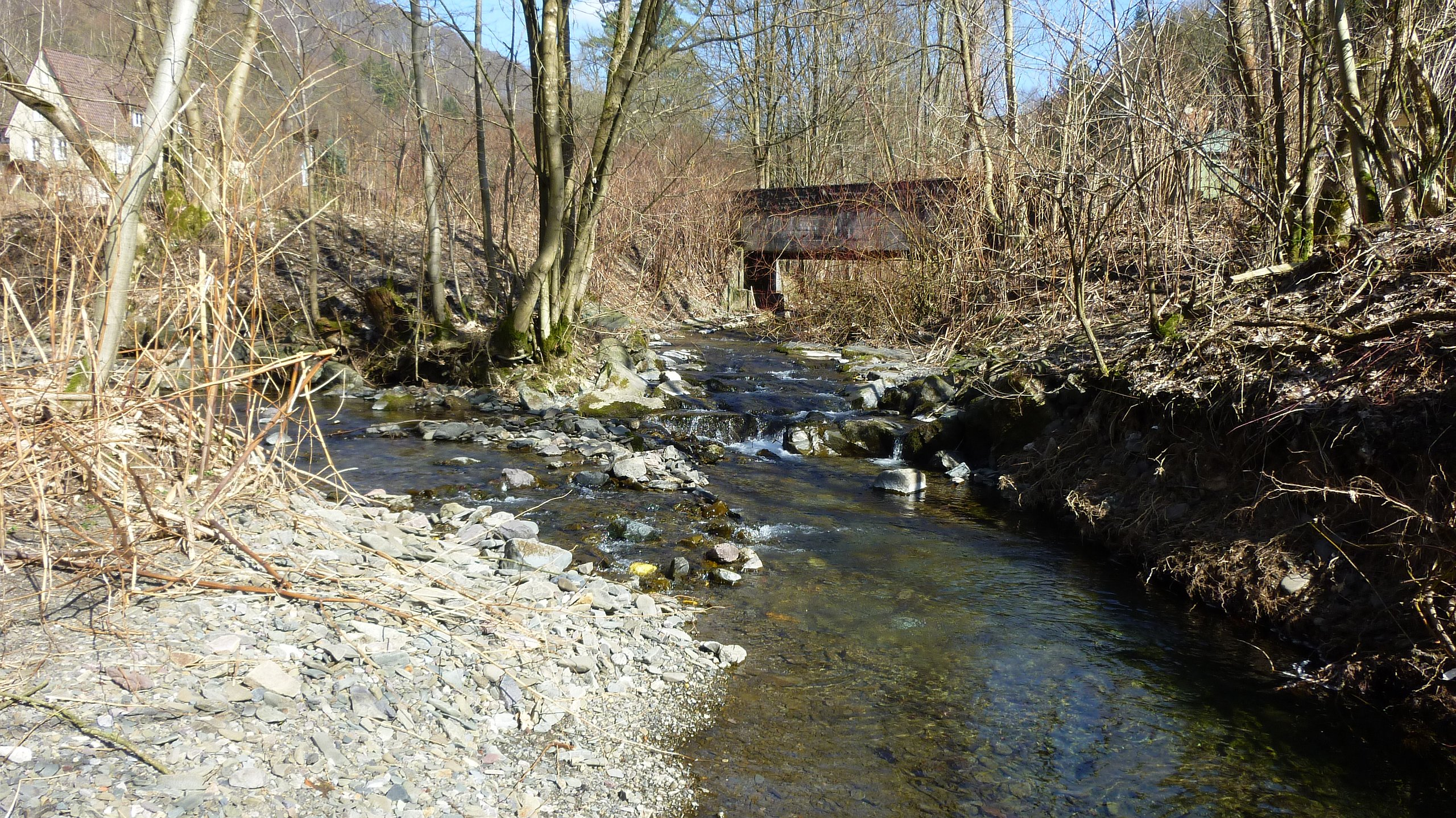 Zusammenfluss von Grader und Krummer Lutter nördlich von Bad Lauterberg